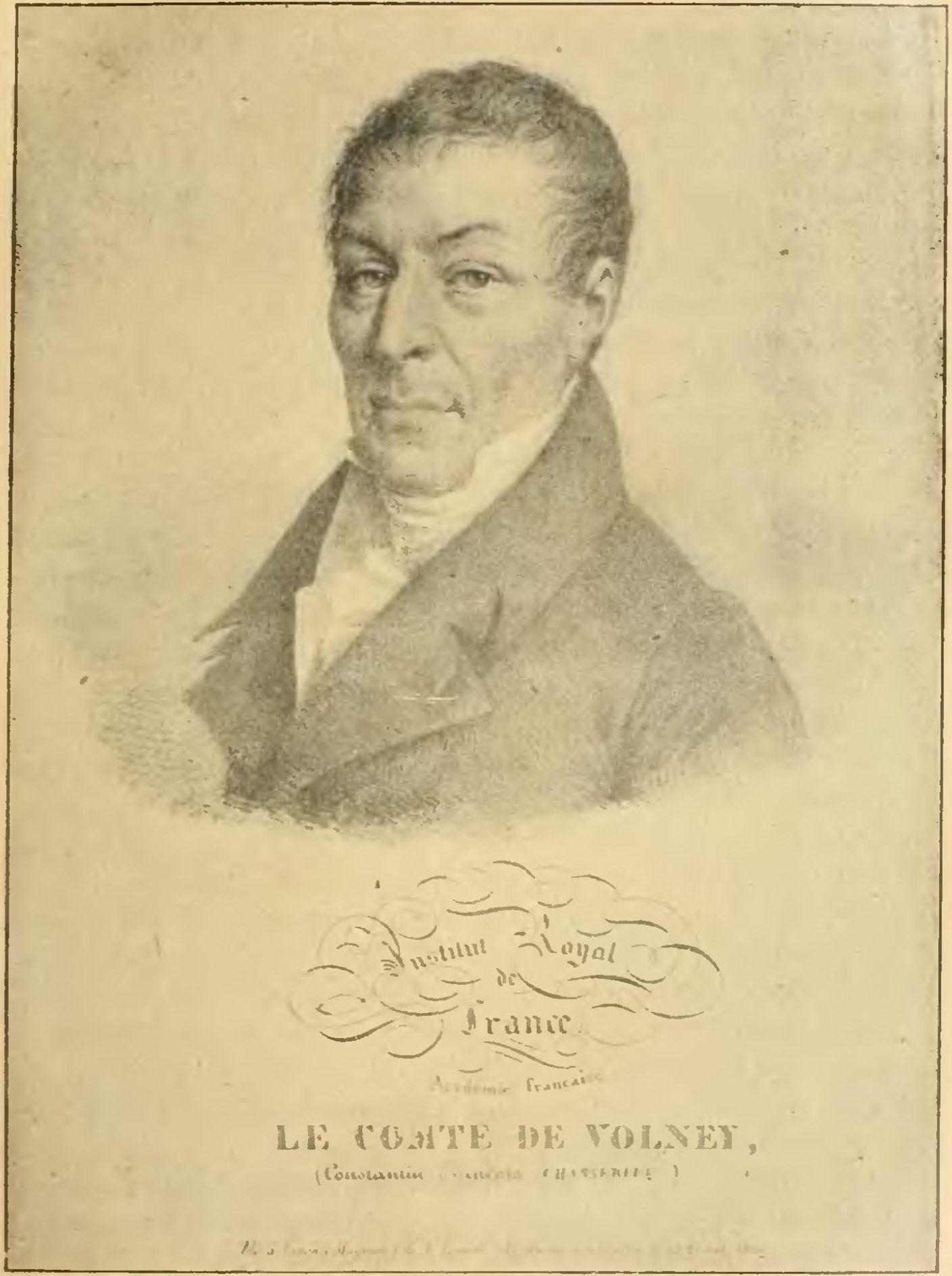 Portrait du Comte de Volney dans l'Histoire socialiste de la France contemporaine (tome I).